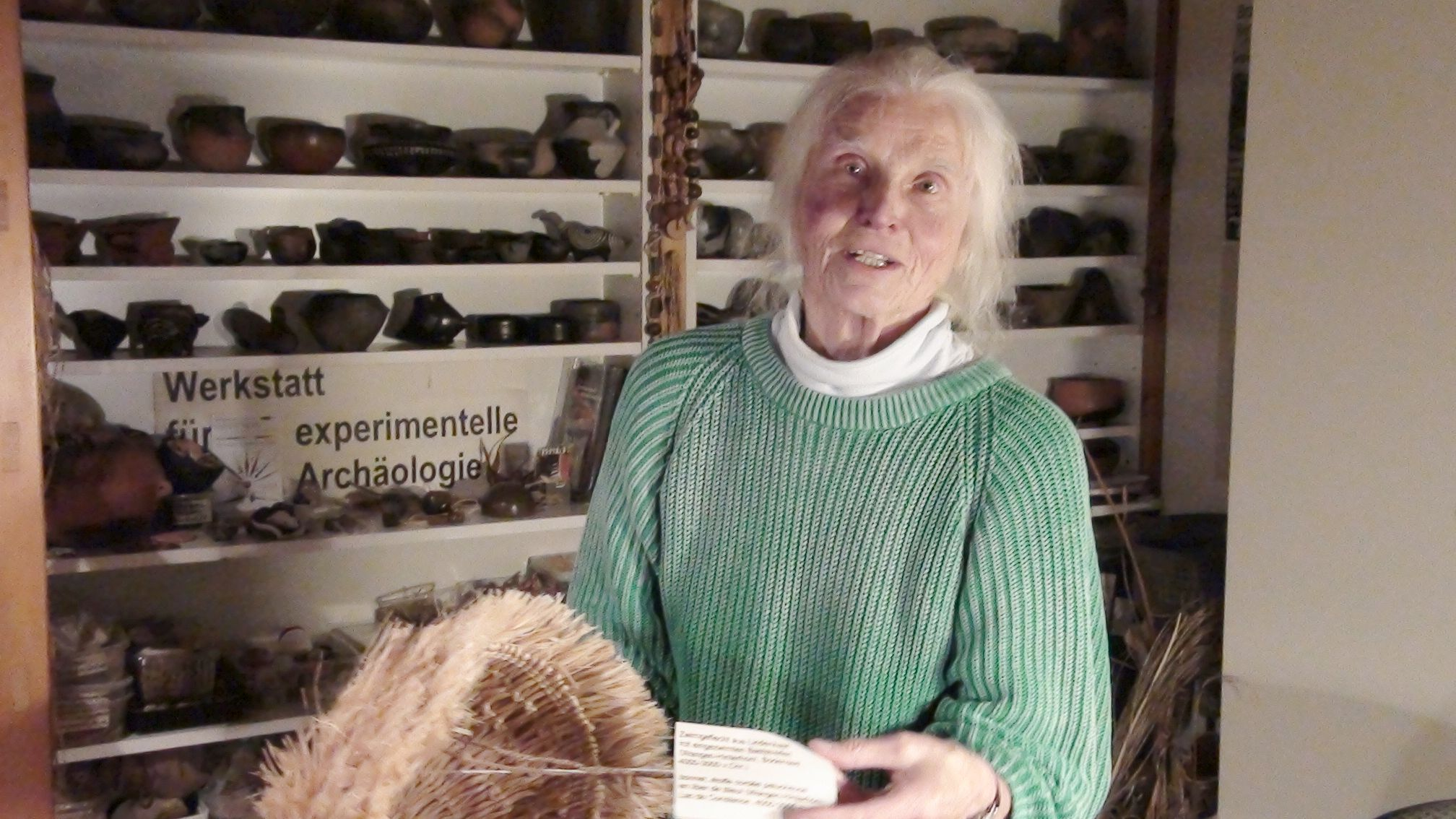 Frau Reichert in ihrer Werkstatt